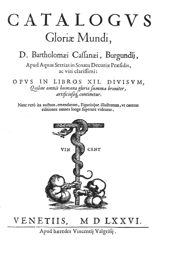 Cassaneus, az 1676-os kiadás címlapja